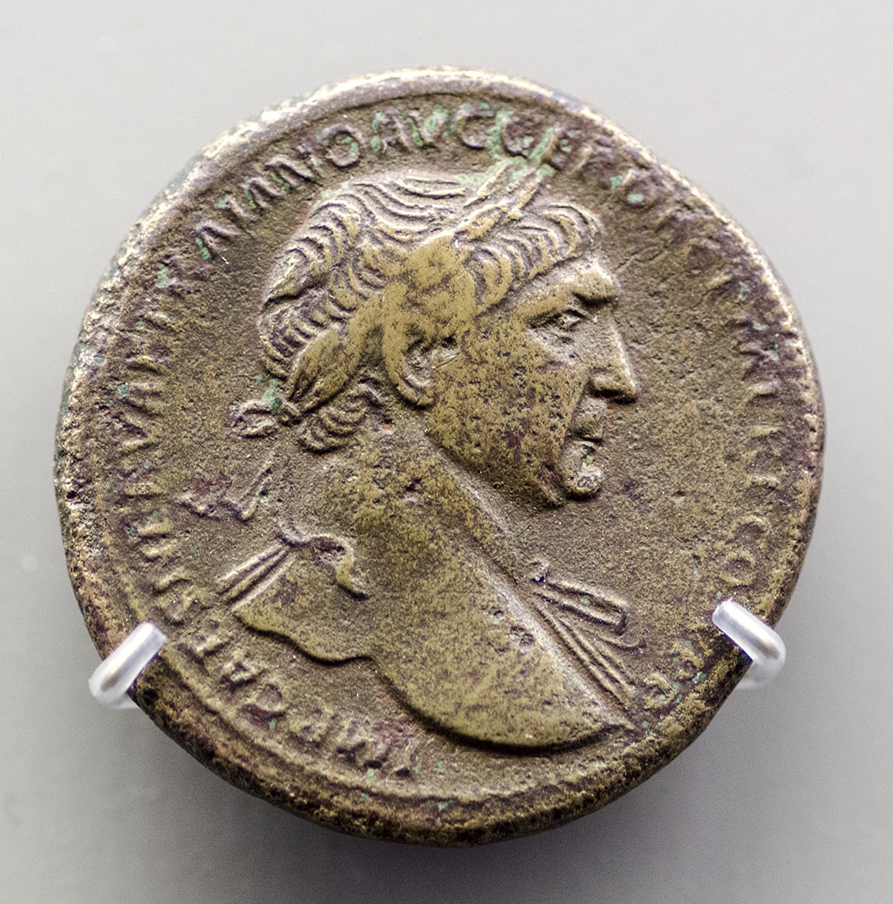 Moneda romana con la efigie de Trajano.